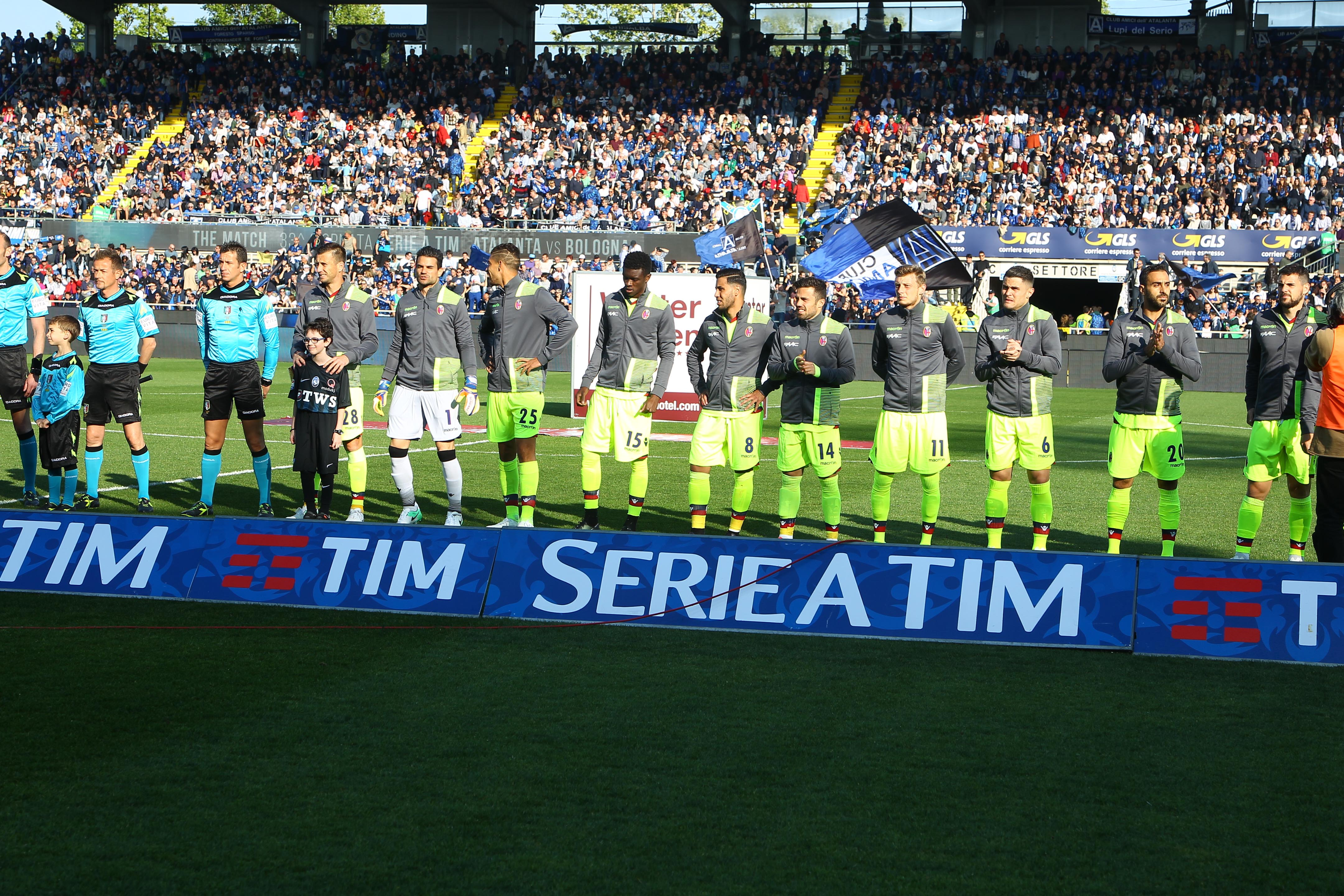 Bergamo, stadio Atleti Azzurri d'Italia, 22 aprile 2017. La formazione del Bologna scesa in campo nella trasferta persa contro l'Atalanta (2-3) e valevole per la 33ª giornata del campionato italiano di Serie A 2016-17.